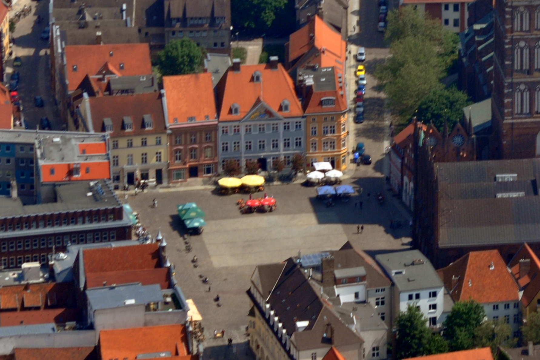 Die Bilder wurden von mir während eines einstündigen Rundflugs ab Flugplatz Güttin am 21. Mai 2011 aufgenommen. Die Bildbeschreibung steht im Dateinamen. Aufgenommen mit einer Nikon D5000 durch das Seitenfenster des Flugzeugs.